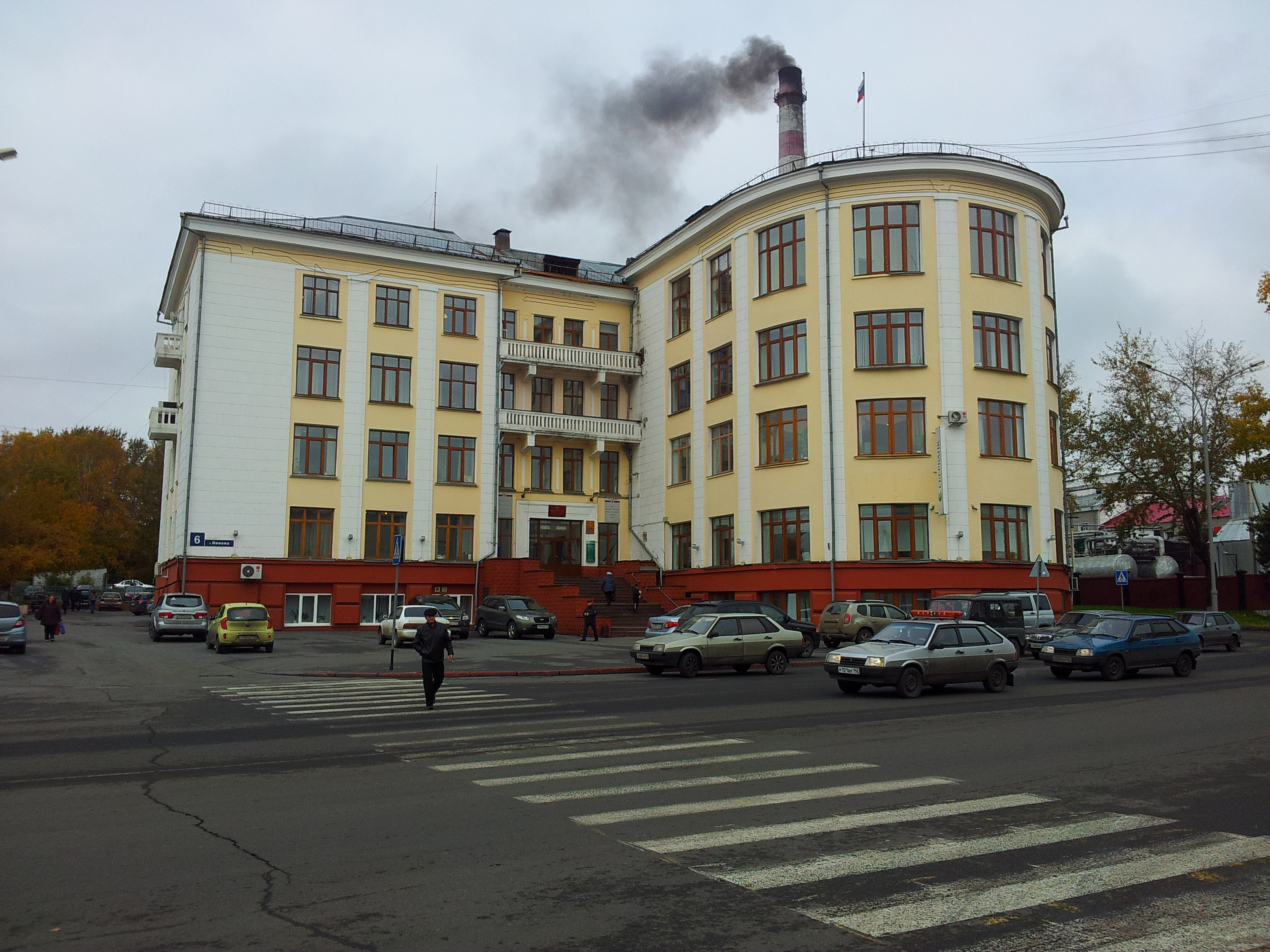 Дом советов. здесь в годы Великой Отечественной войны размещался эвакогоспиталь № 1246 (Кемеровская область, Анжеро-Судженск, улица Ленина, 6)